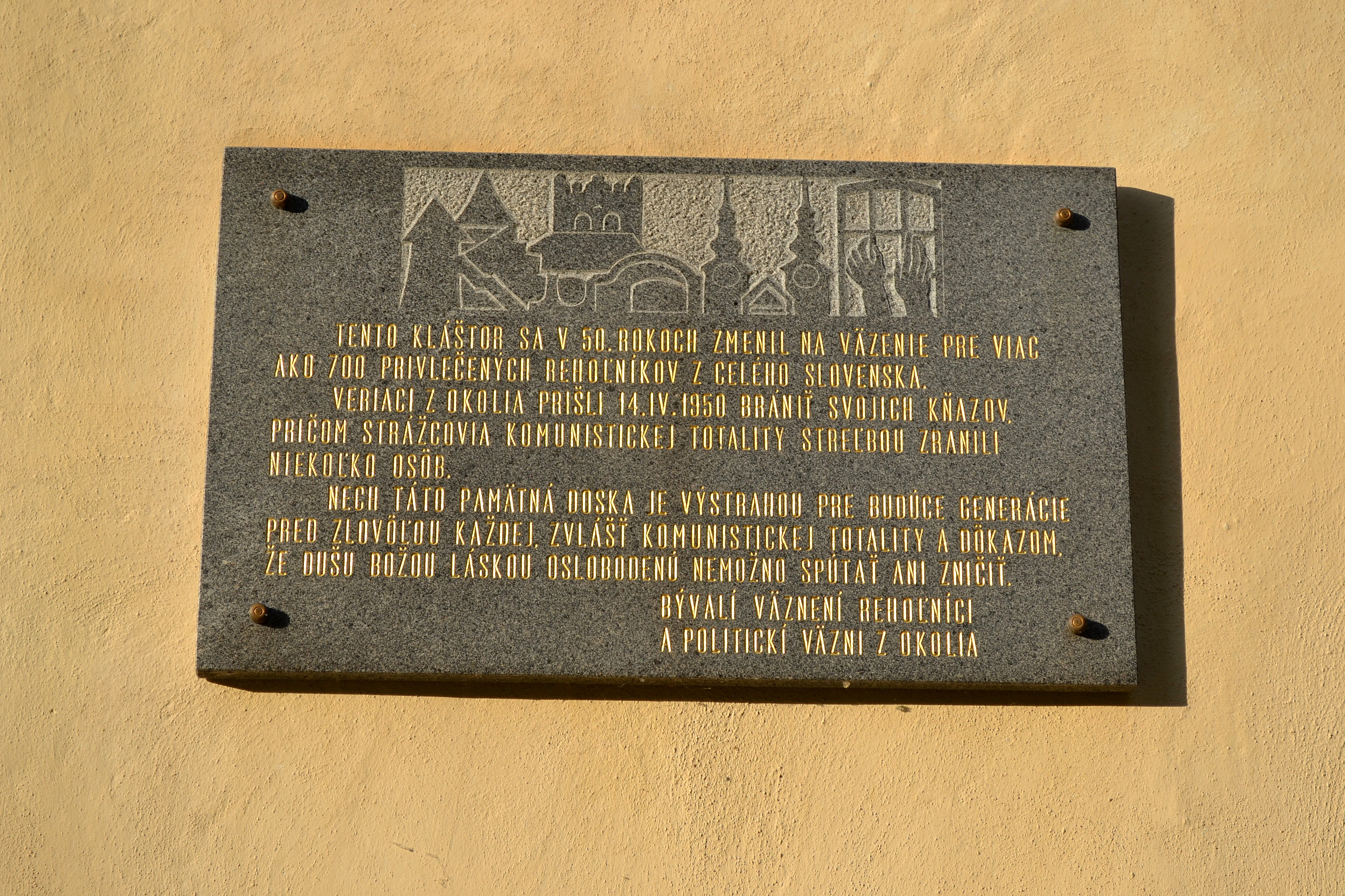 Tabuľa na fasáde kláštora venovaná udalosti, ku ktorej prišlo 14. apríla 1950, kedy veriaci bránili tu internovaných kňazov a rehoľníkov